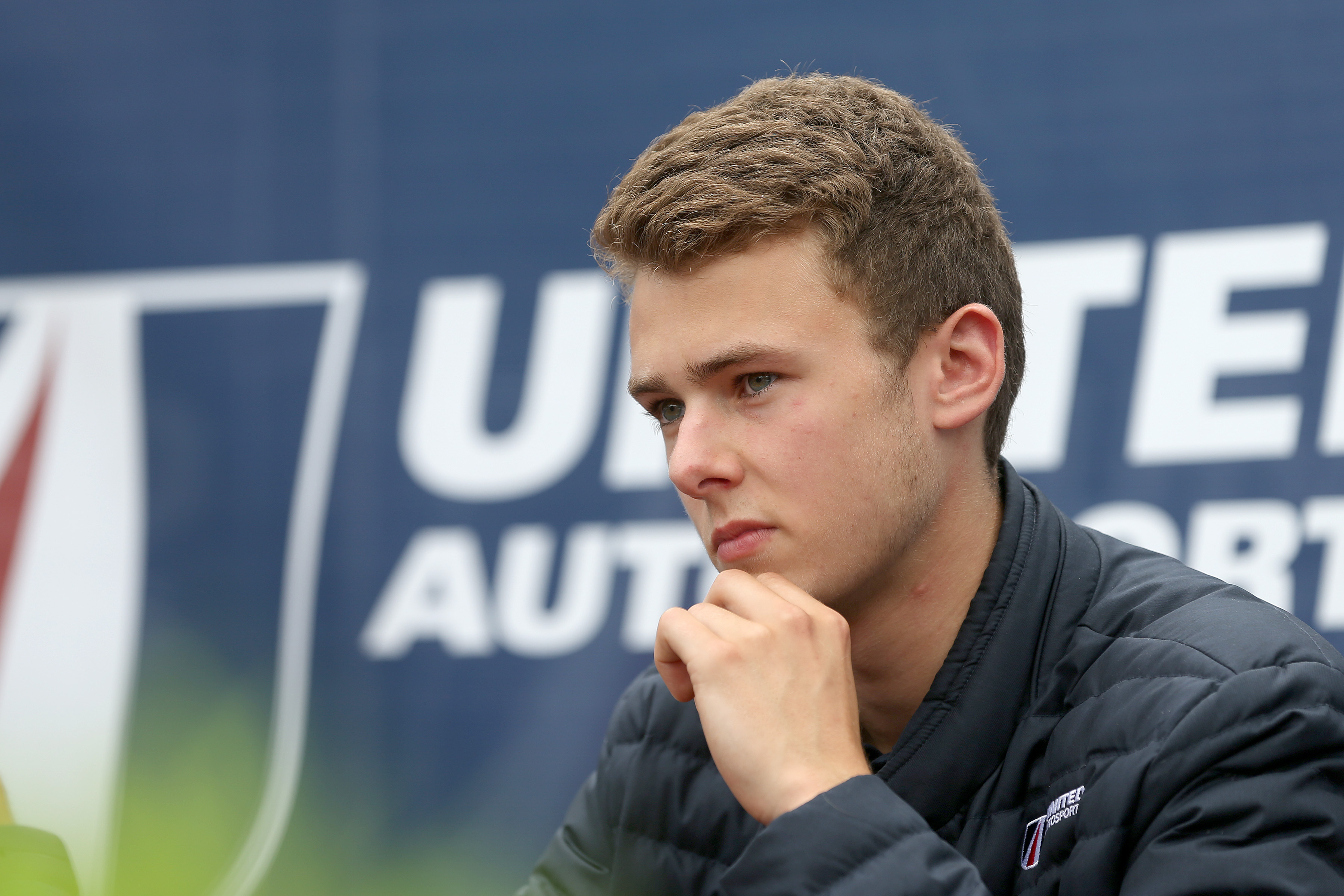 United Autosport lors des 24 Heures du Mans 2018.